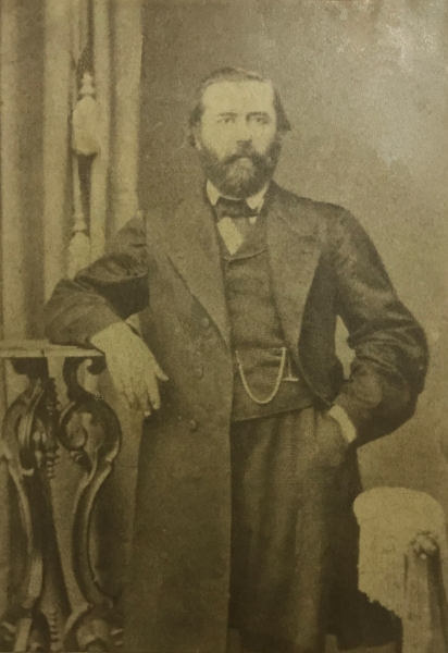 Промышленник, купец, потомственный почётный гражданин